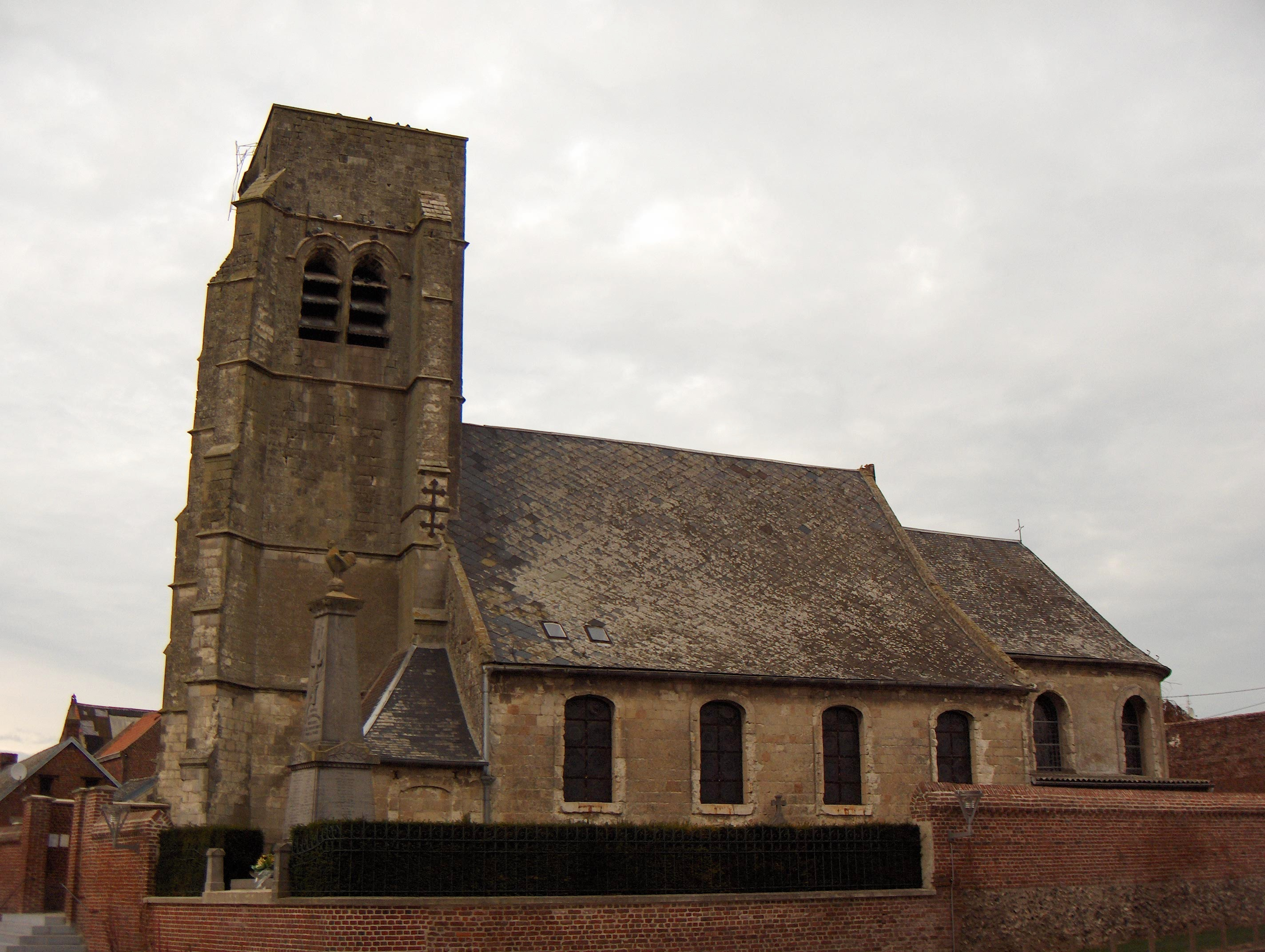 Dorfkirche Sankt Medardus von Boussières-en-Cambrésis, Frankreich (Dept. Nord), Turm aus dem 16. Jh.